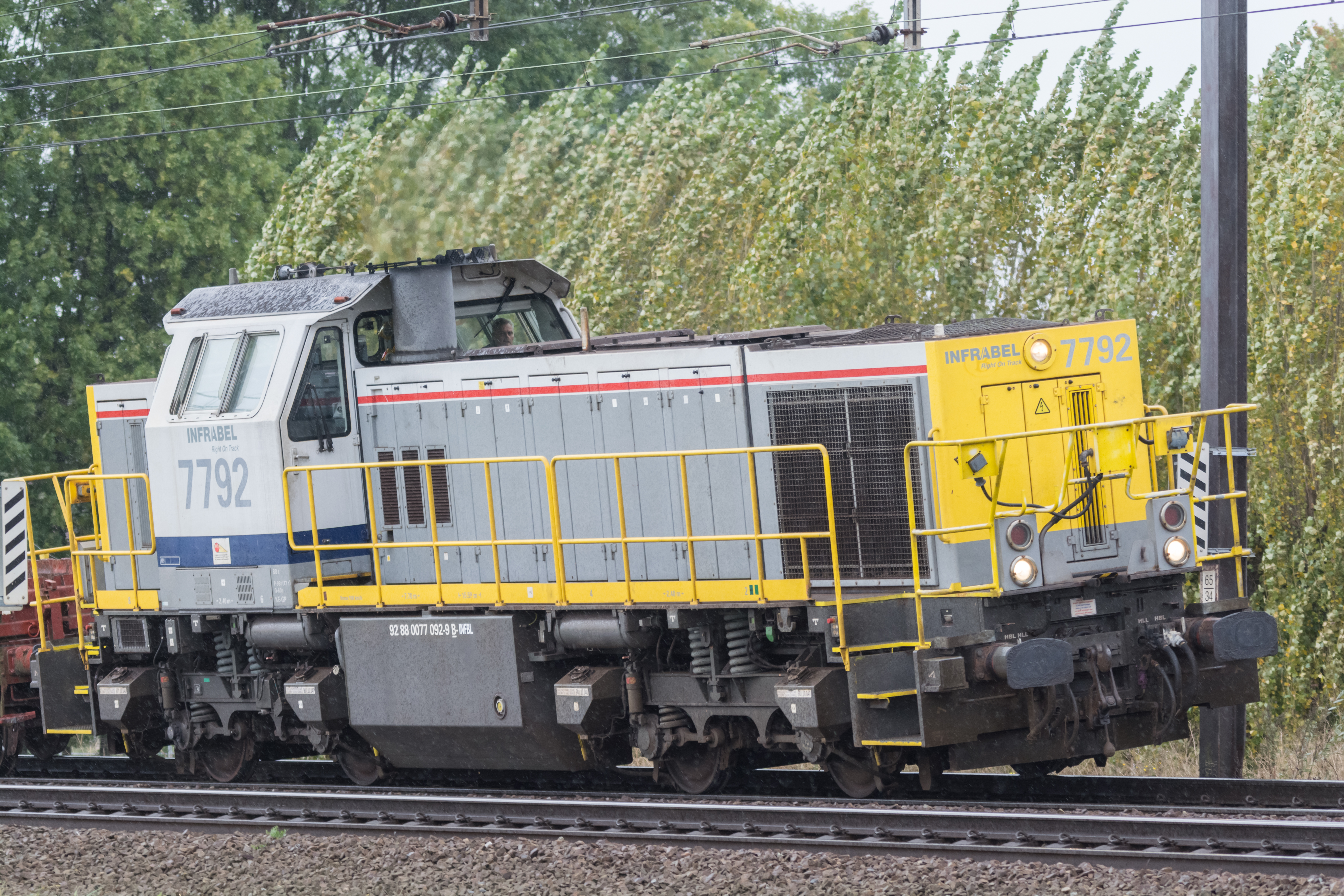 Série 77(7792) Infrabel ligne 12